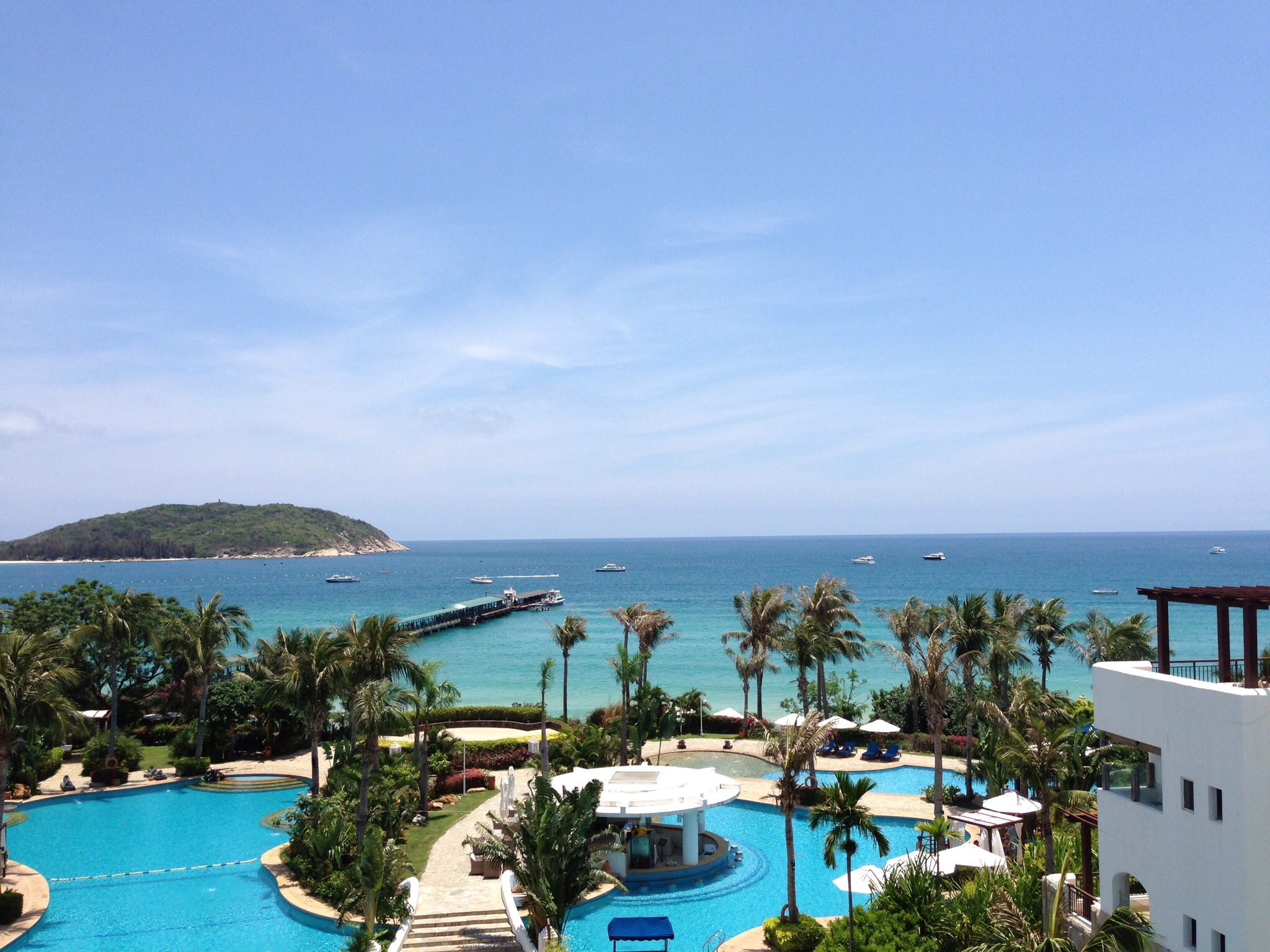 爱情海酒店